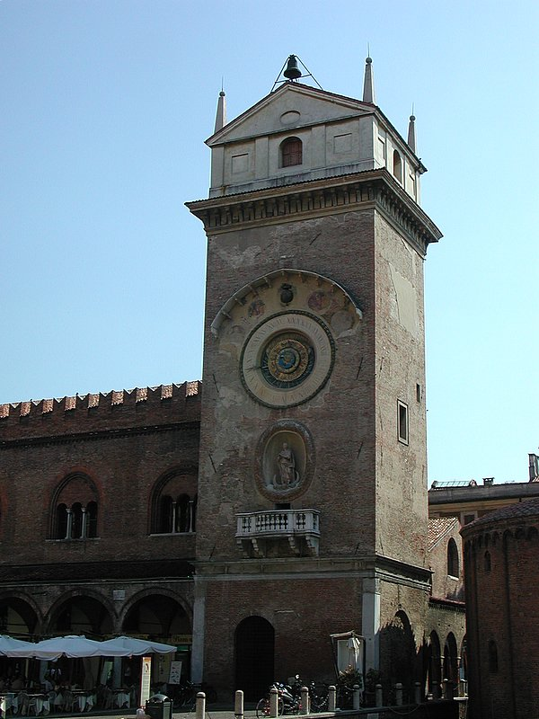 La torre del Palazzo della Ragione a Mantova, realizzata dall'architetto Luca Fancelli nel 1473. Source: photo uploaded by User:RicciSpeziari. Photographer: Riccardo Speziari